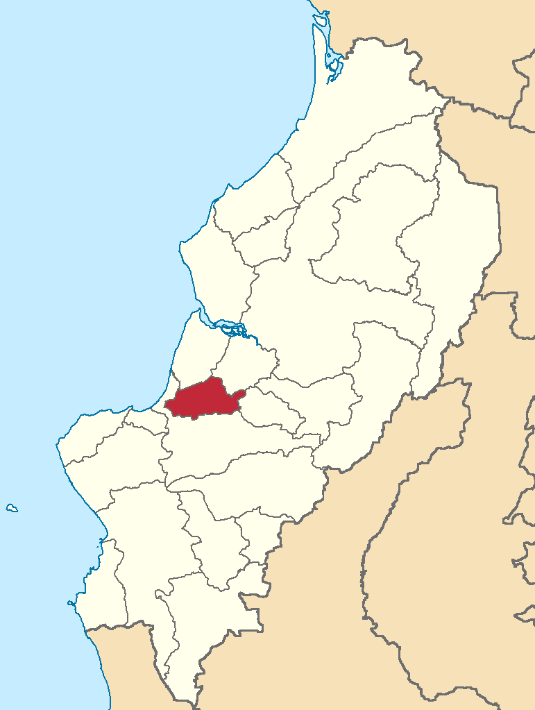 Mapa localizador del cantón en Manabí, Ecuador